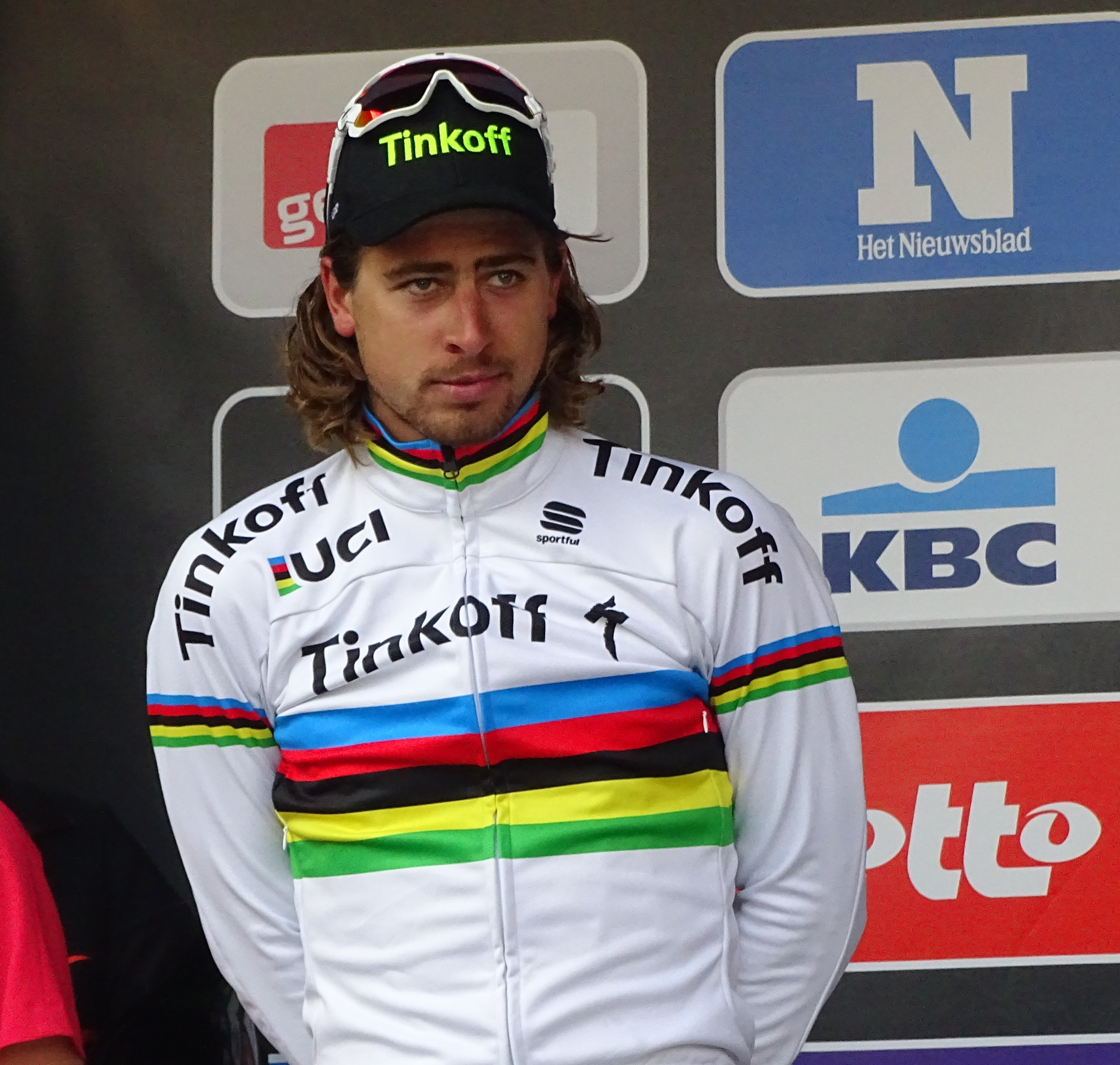 Reportage réalisé le samedi 27 février à l'occasion du départ et de l'arrivée du Circuit Het Nieuwsblad 2016 et de l'arrivée du Circuit Het Nieuwsblad féminin 2016 à Gand, Belgique.